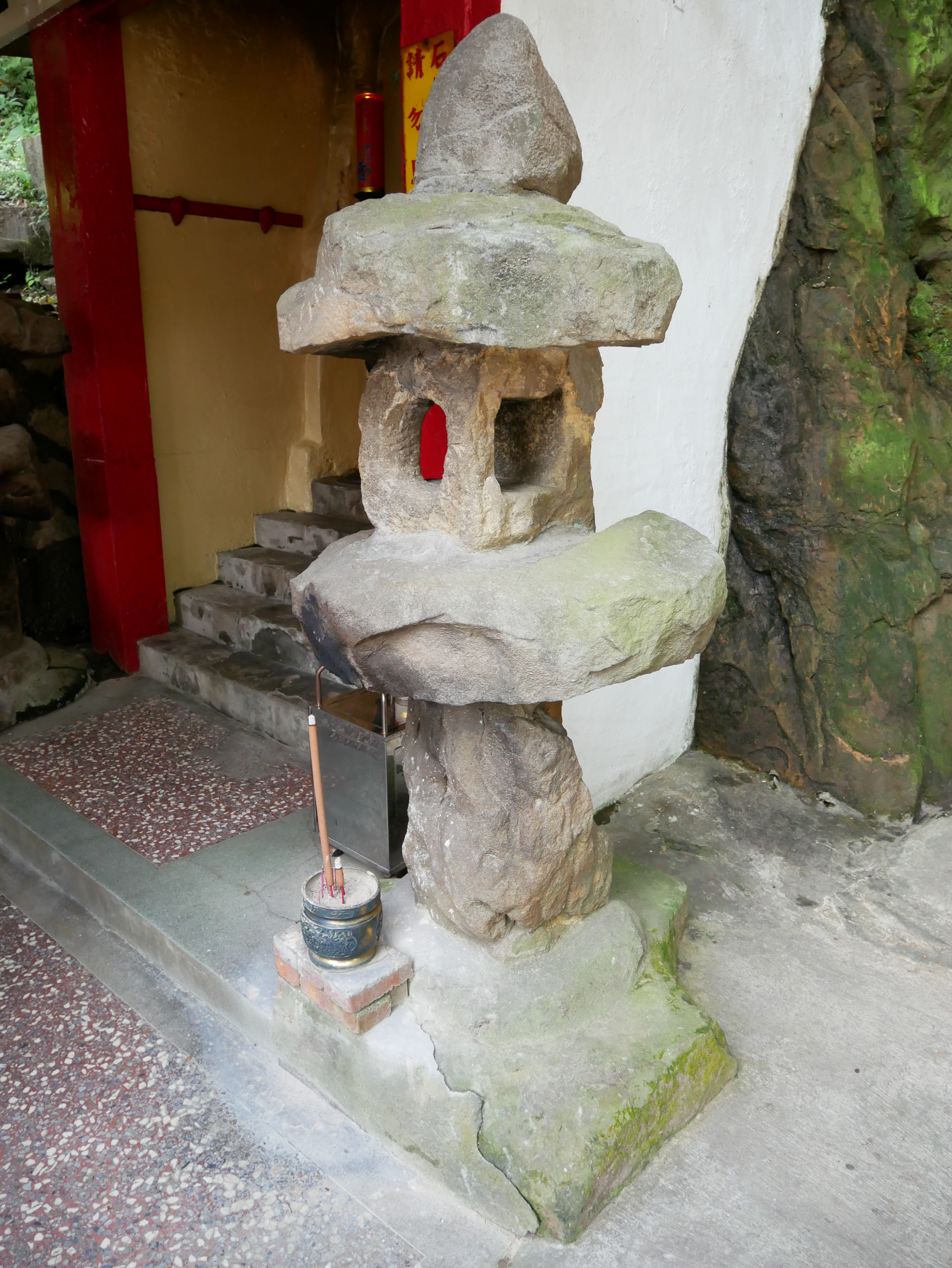 北投不動明王石窟石燈籠，臺北市北投區新北投次分區林泉里